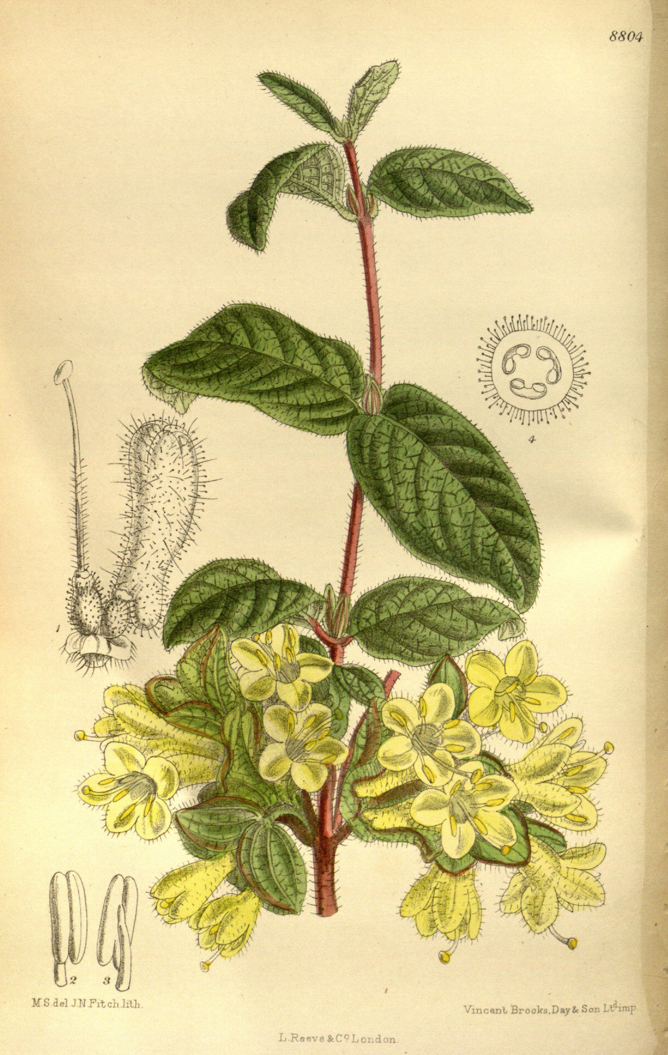 Lonicera chaetocarpa (= Lonicera hispida var. hispida), Caprifoliaceae